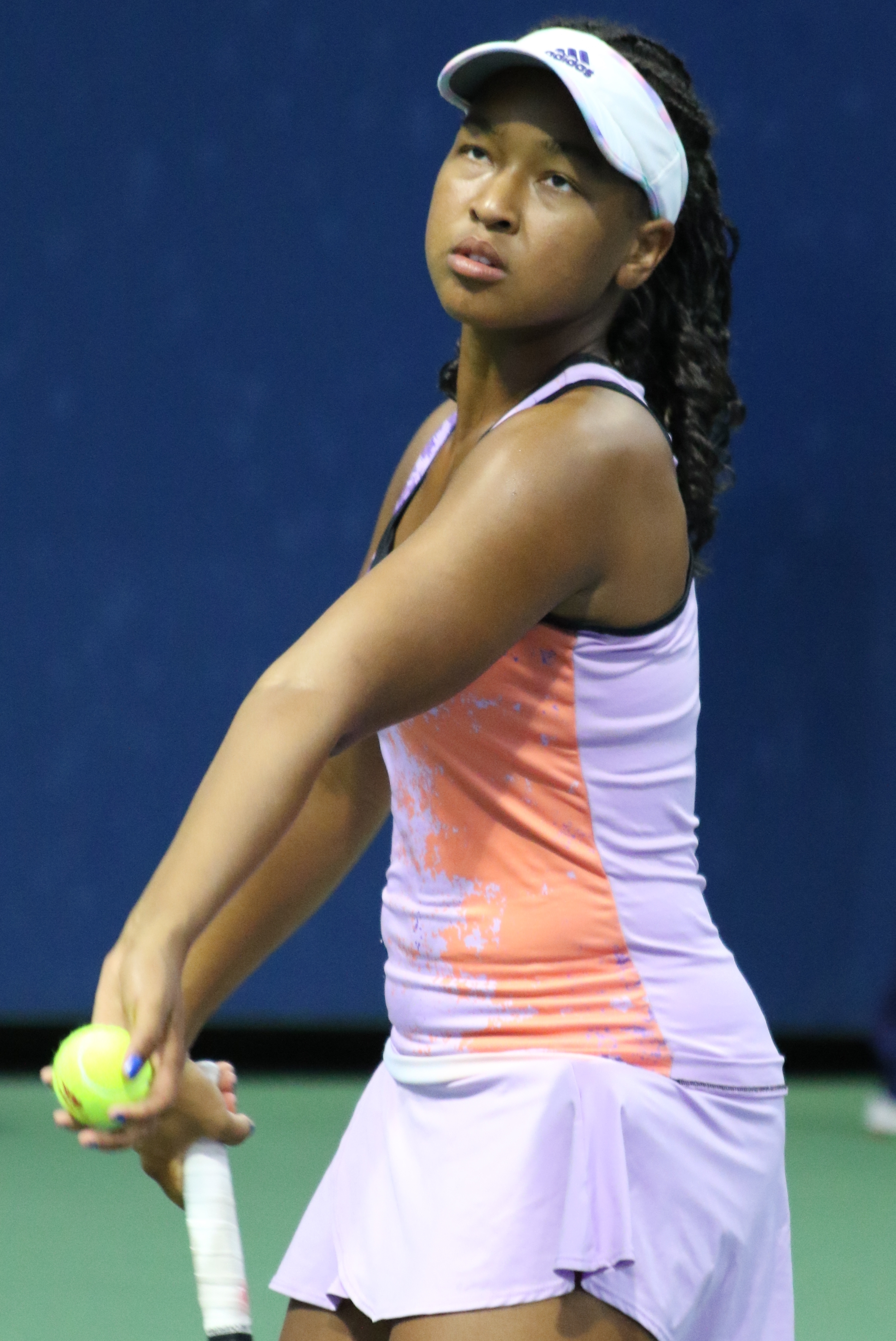 Hart US16 (3)